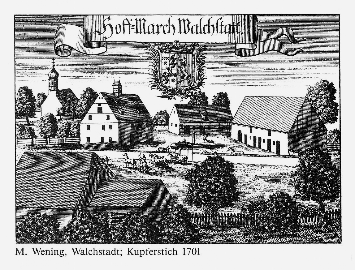 Wörthsee, OT Walchstadt, Schlossbauernhof, Kupferstich von Michael Wening